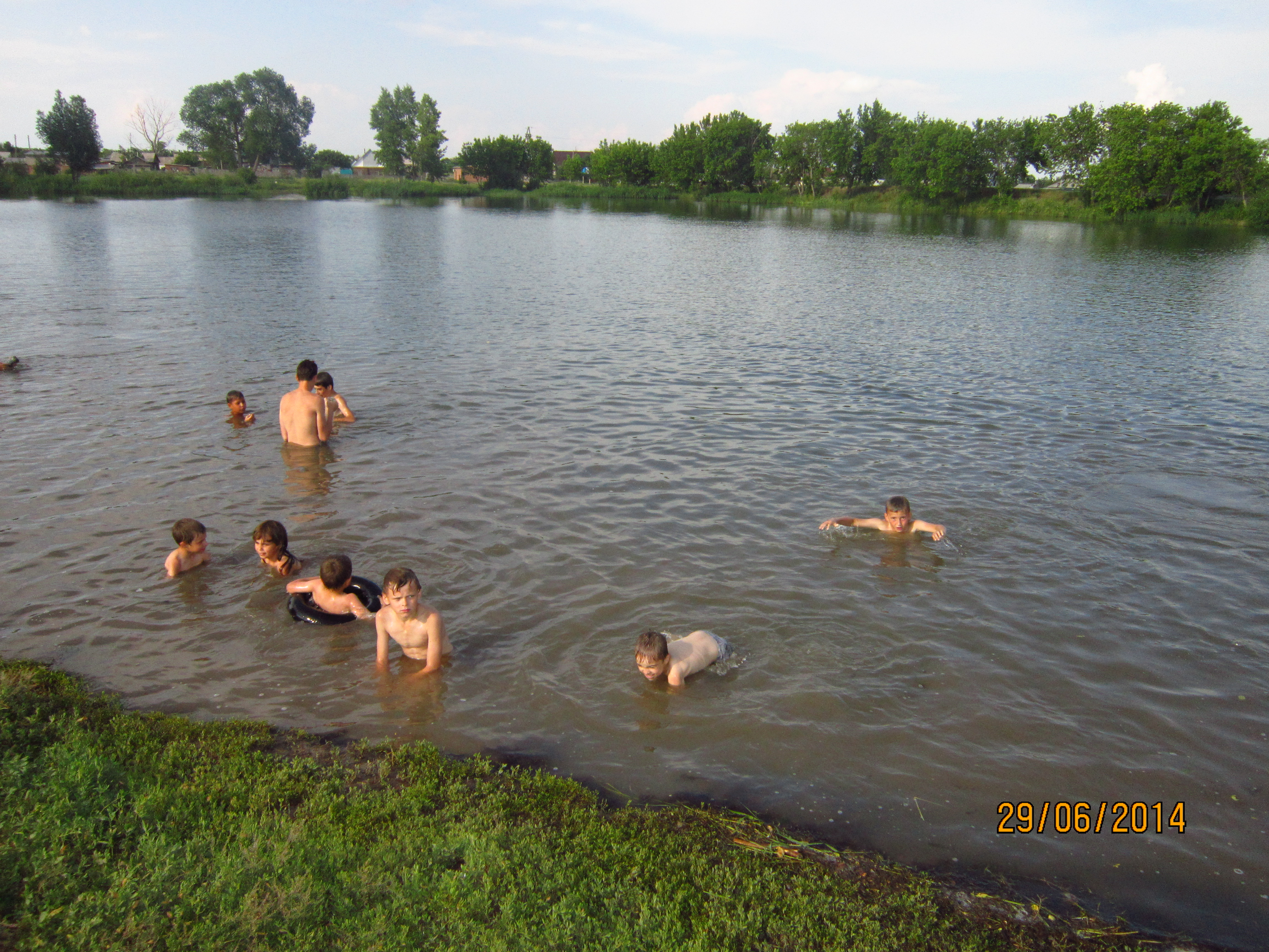 Пруд в селе Романово Алтайский край